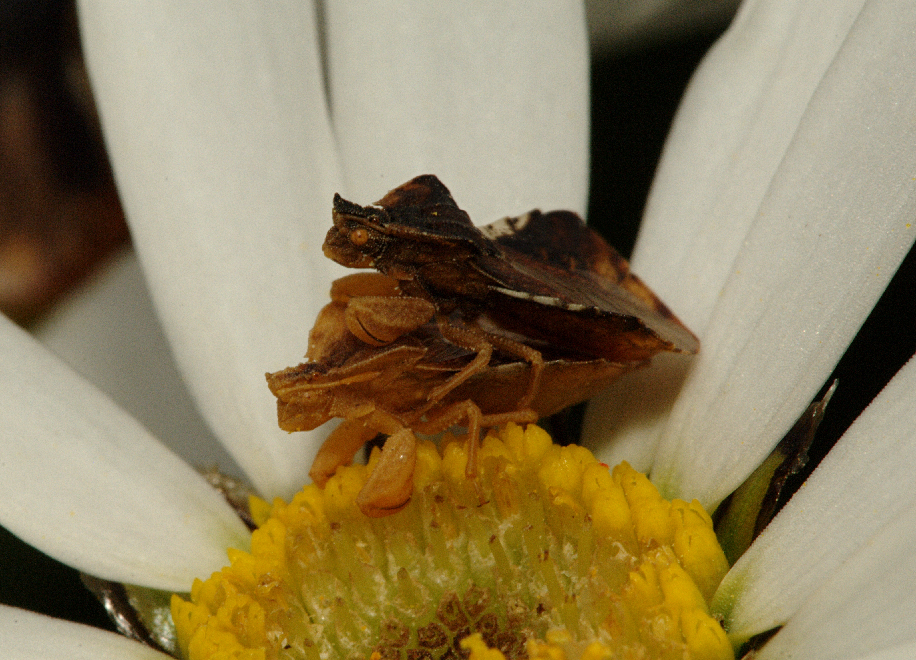 Phymata crassipes, mating